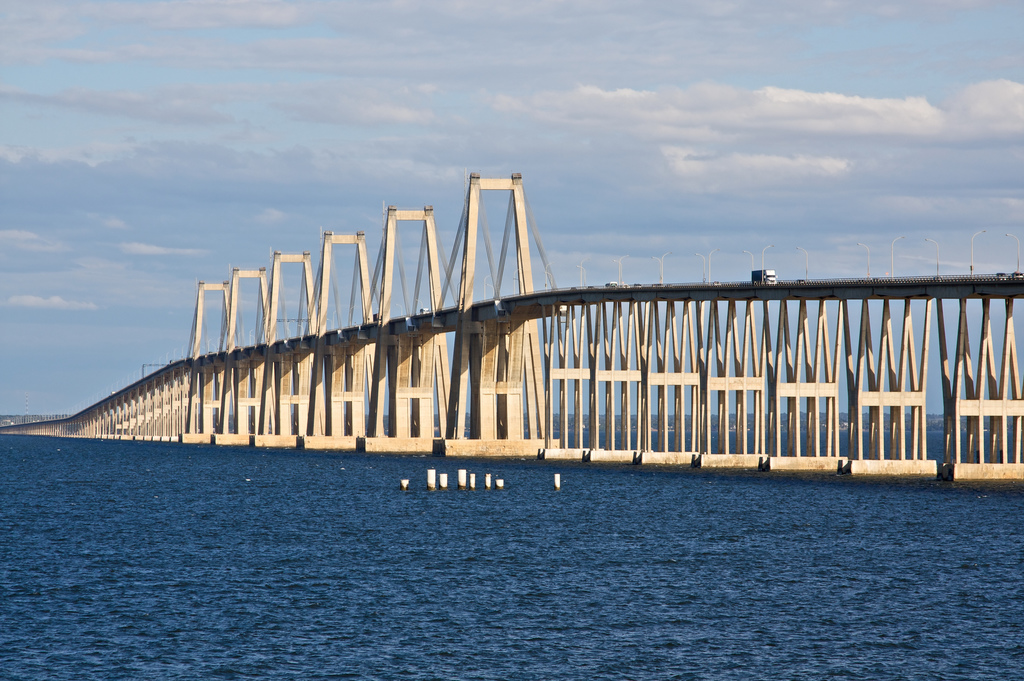 El puente General Rafael Urdaneta o puente sobre el Lago, como es llamado localmente; cruza la parte más angosta del Lago de Maracaibo, en el Estado Zulia, al noroeste de Venezuela, y conecta la ciudad de Maracaibo con el resto del país. Fue nombrado en honor del General Rafael Urdaneta, militar zuliano de la independencia de Venezuela.